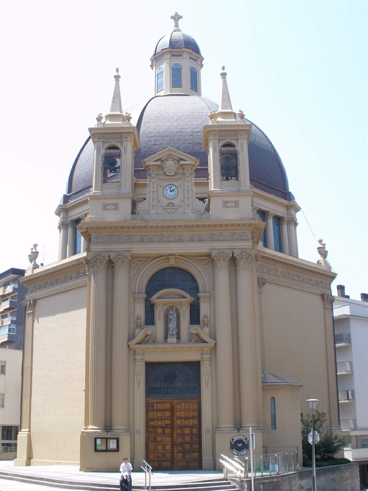 Iglesia de San Gabriel y Santa Gema (Irún)